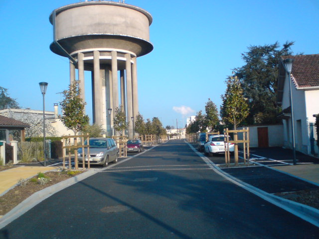 Photo d'une rue de la ville du Passage d'Agen